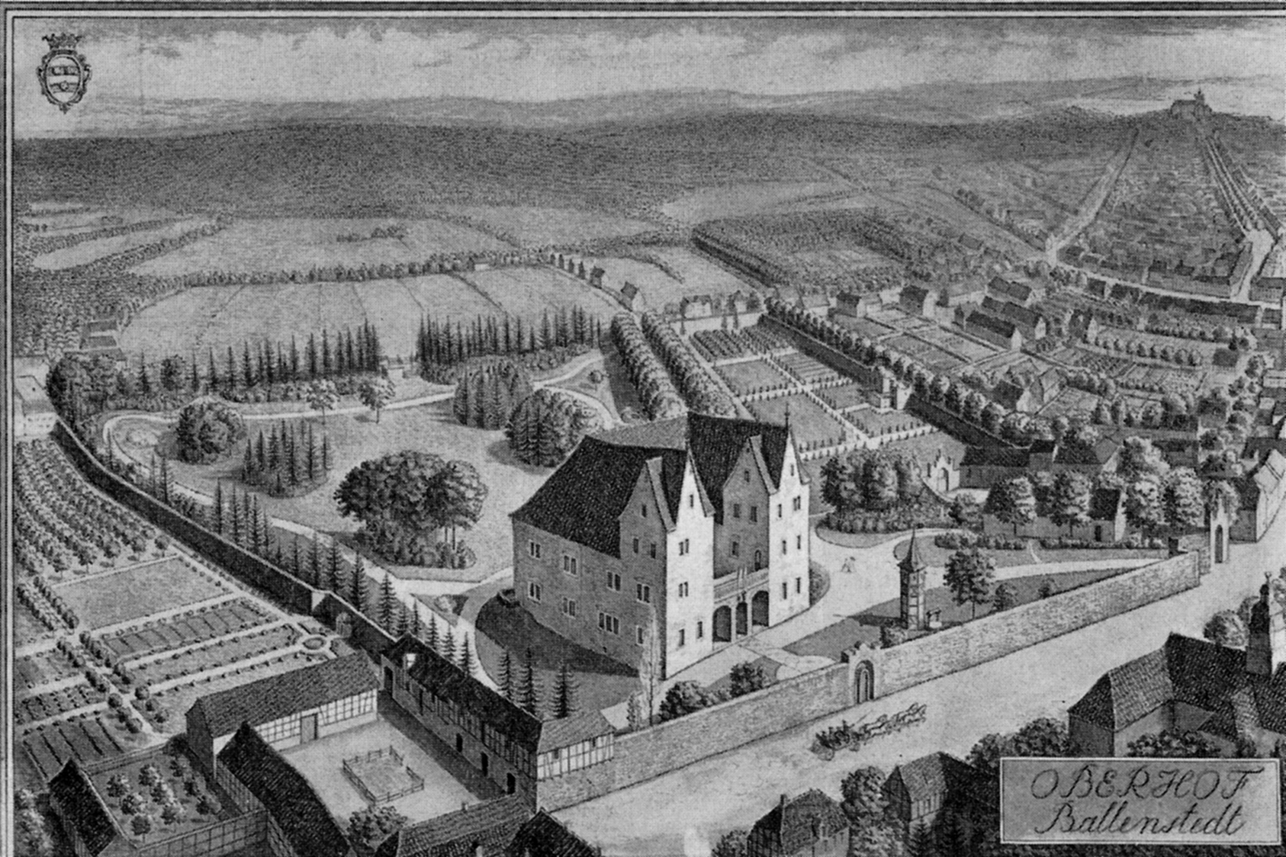 Oberhof Ballenstedt 1937 - Zeichnung von Anco Wigboldus, lavierte Federzeichnung, Zustand des Oberhofes und seiner Umgebung nach dem Ersten Weltkrieg in idealisierender Form